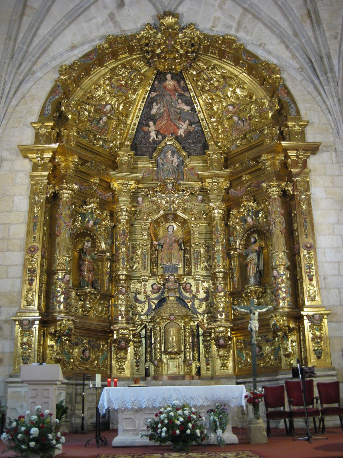 Retablo mayor de la iglesia de Canicosa de la Sierra (Burgos, España).